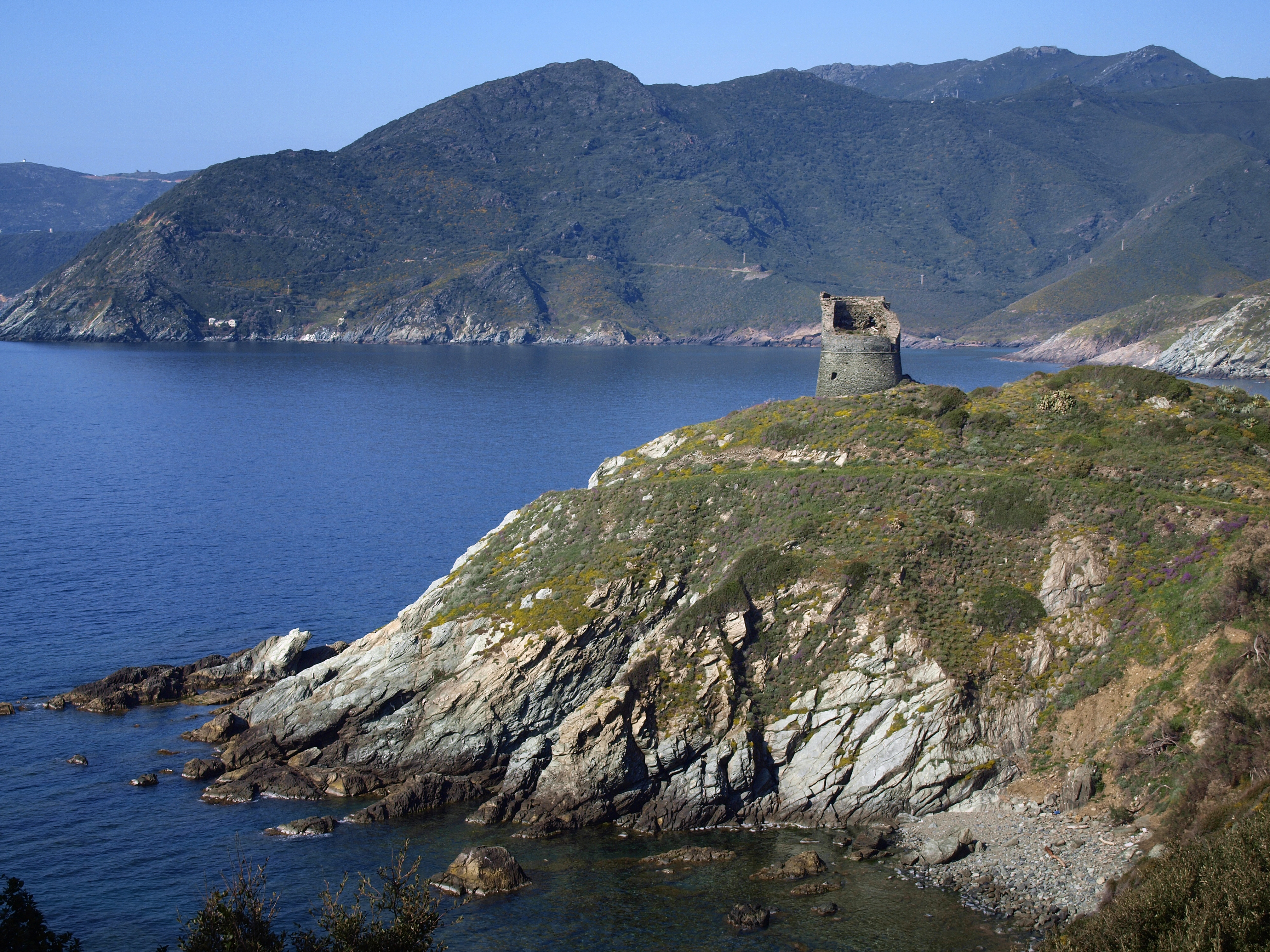 Pino (Corse) - Tour génoise de Scalo